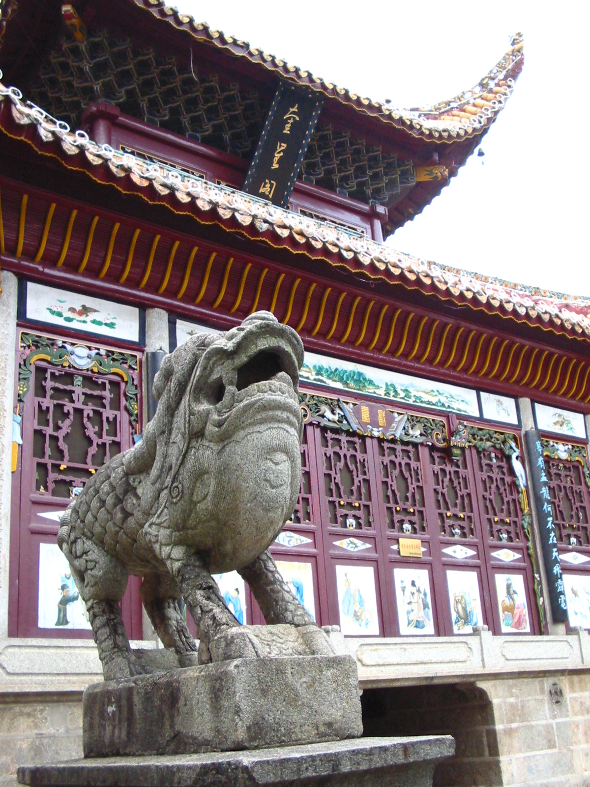 kuixingge,Grand Temple of Mount Heng